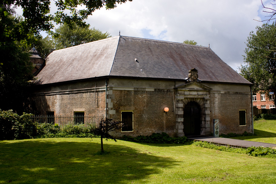 Kruithuis, onderdeel van de vestingwerken van Den Bosch